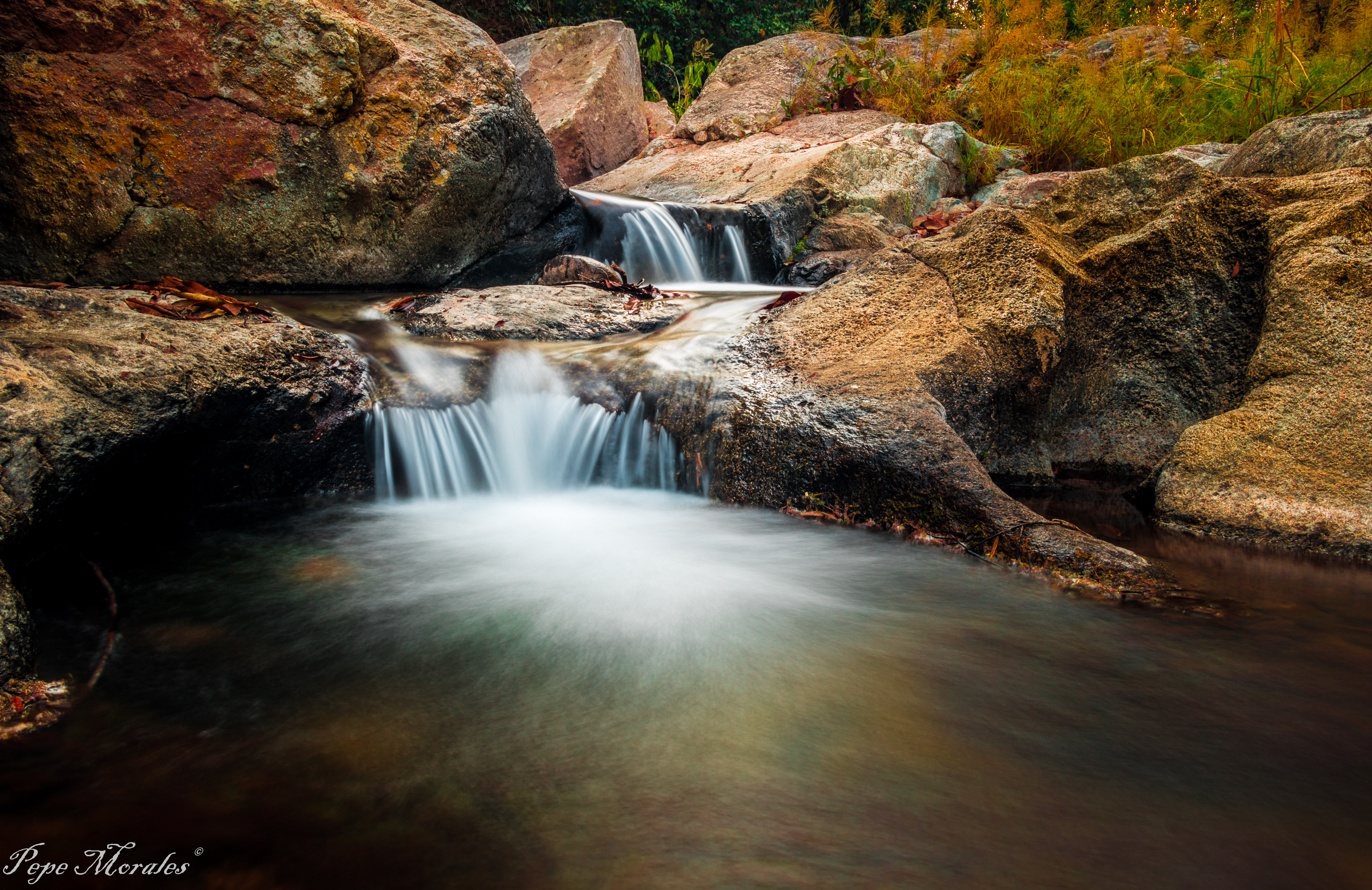 Ayutla cuenta con Ríos y cascadas en su cabecera como en sus alrededores.